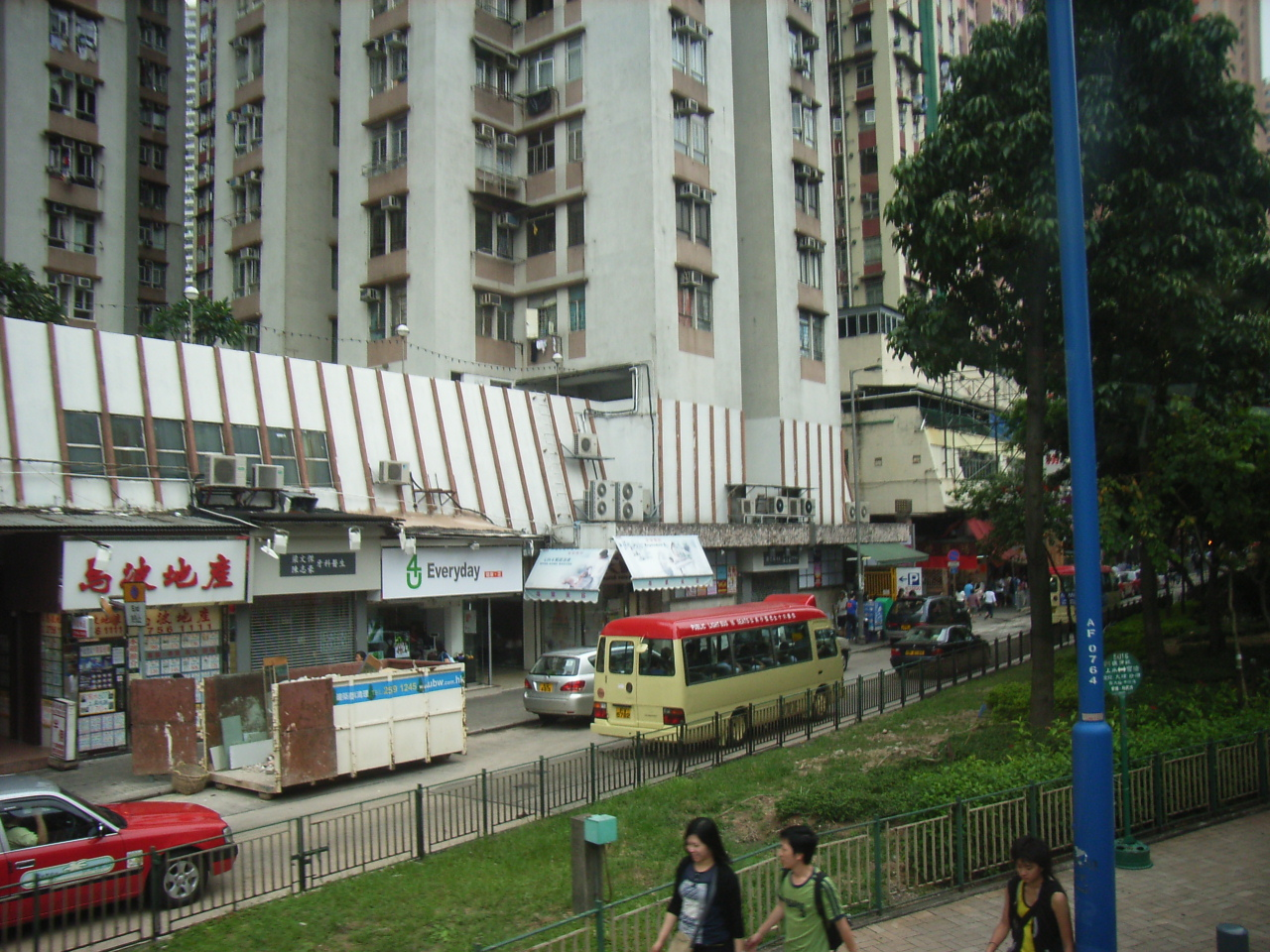 九龍 牛頭角, 牛頭角道 Ngau Tau Kok Road, Ngau Tau Kok, Kowloon, Hong Kong. Photo author is me, User:Kwanyatsw